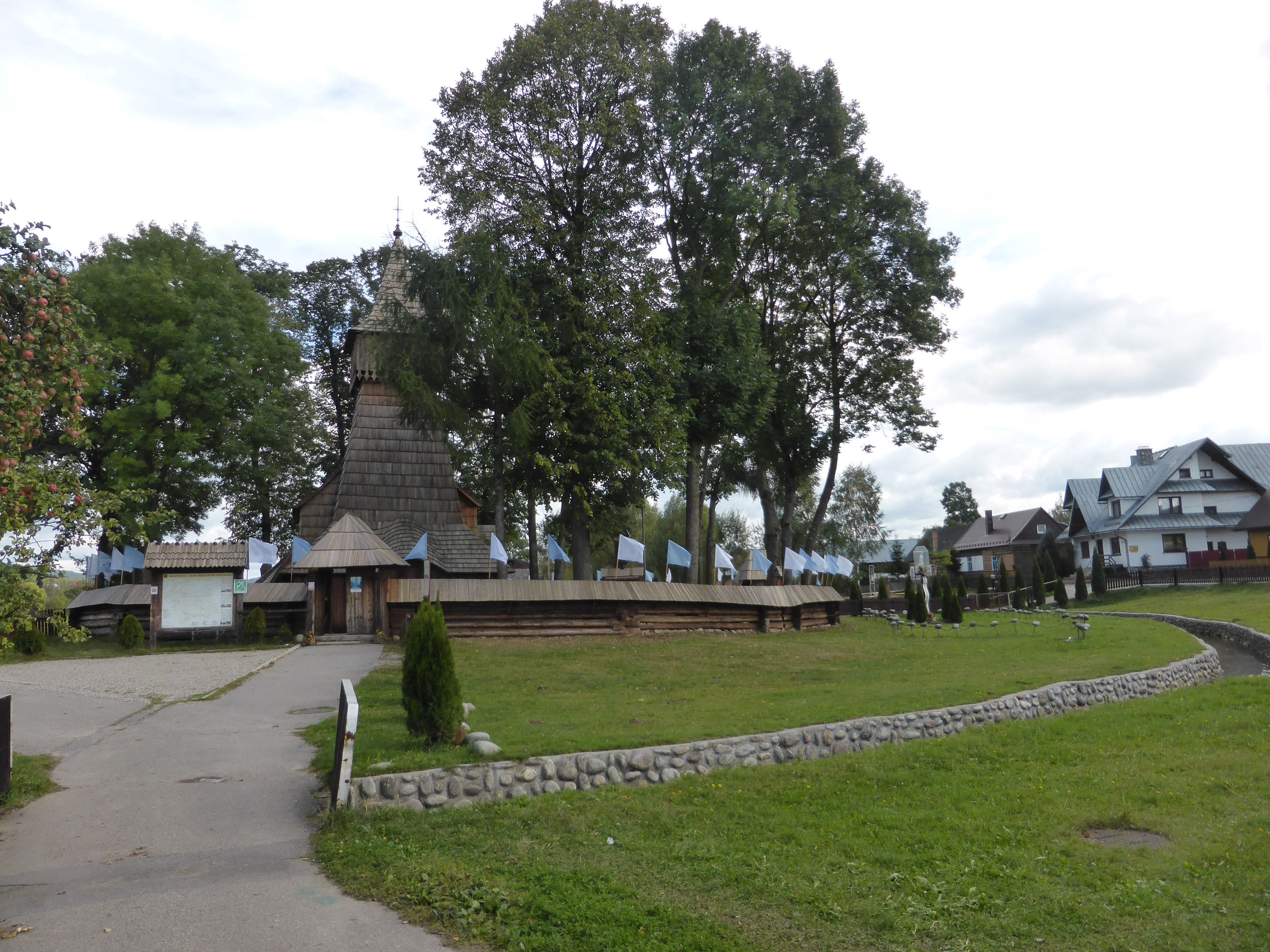 Erzengel_Michael_Kirche_in Debno_Podhalanskie